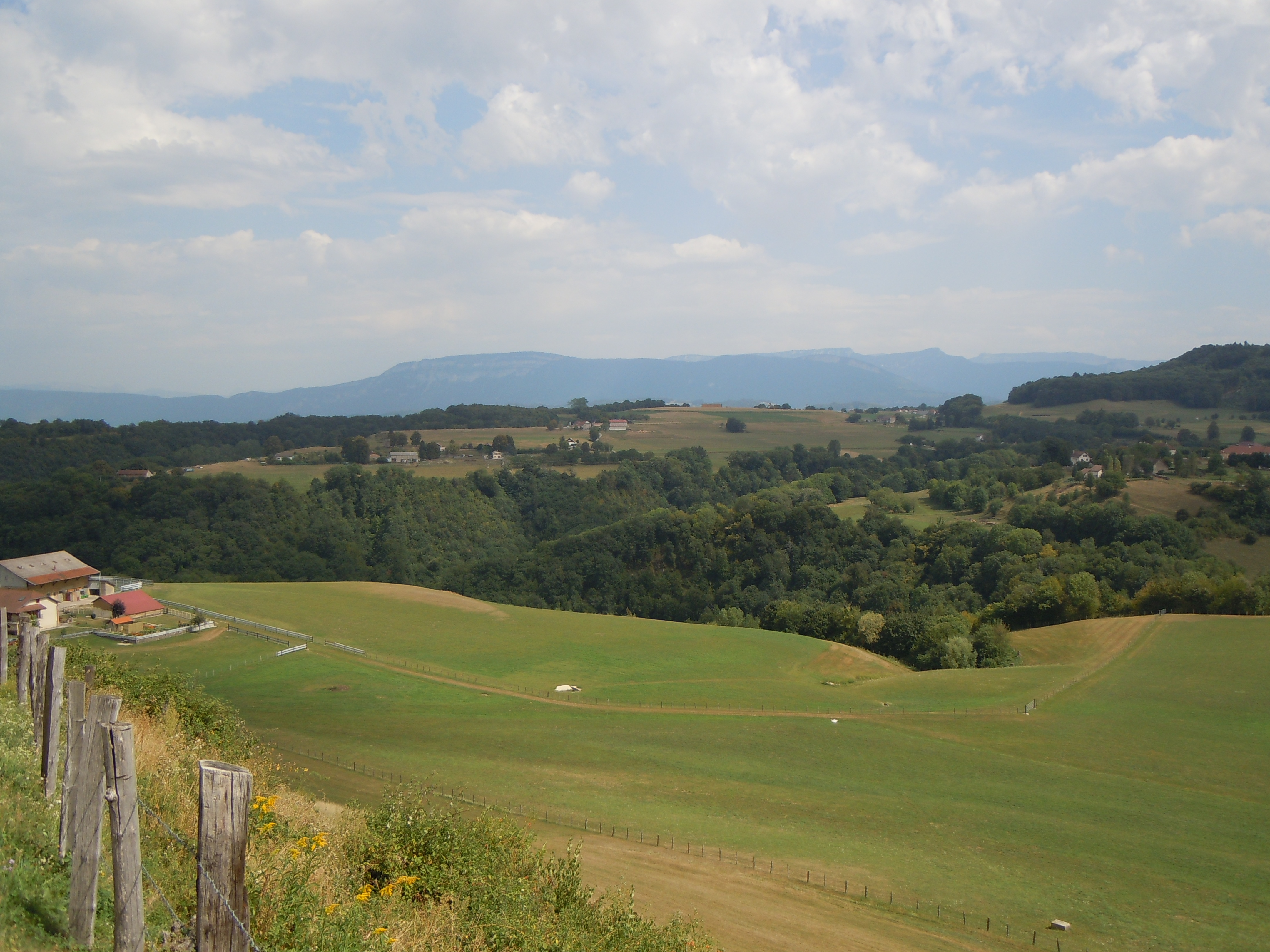 Vallon de Rajan et Combe Pigna depuis le Mont Rond